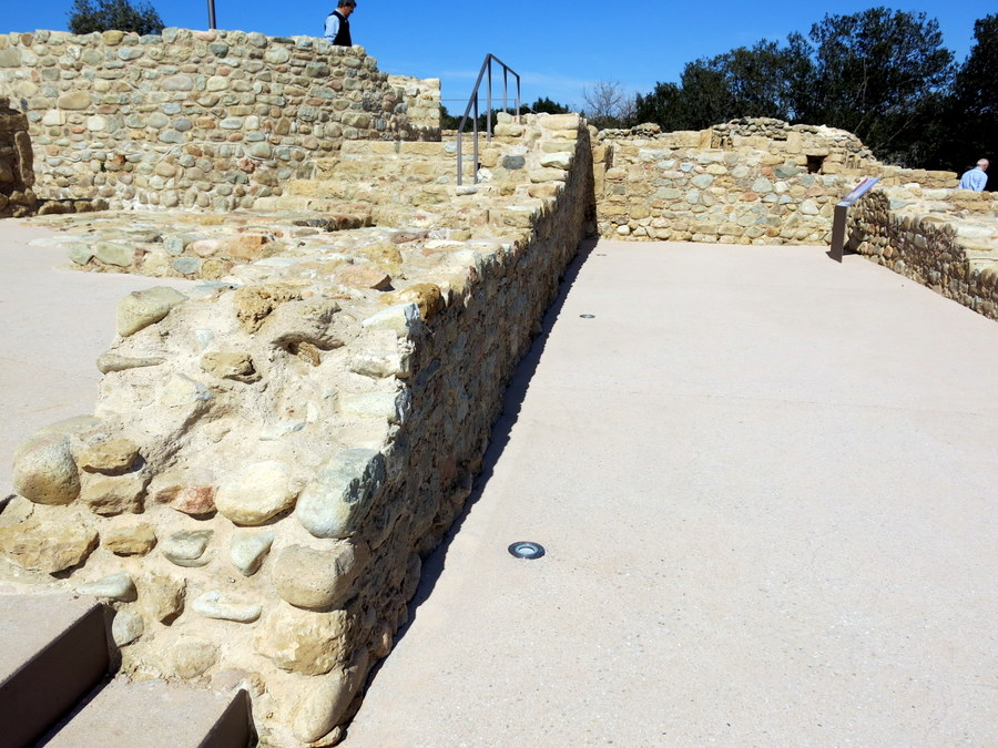 castell de Cervià a la comarca del Gironès